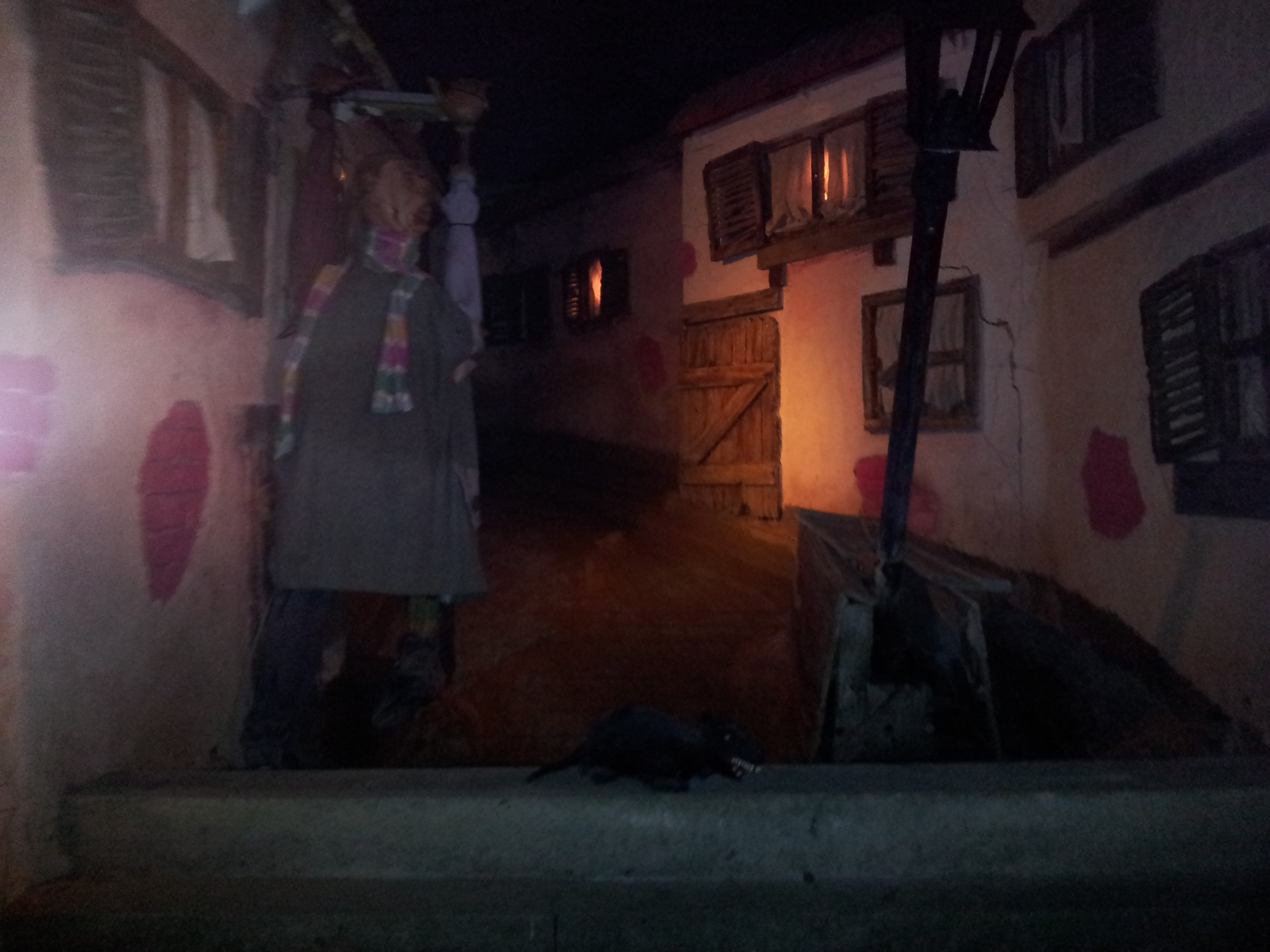 Rastiland Piratenstadt